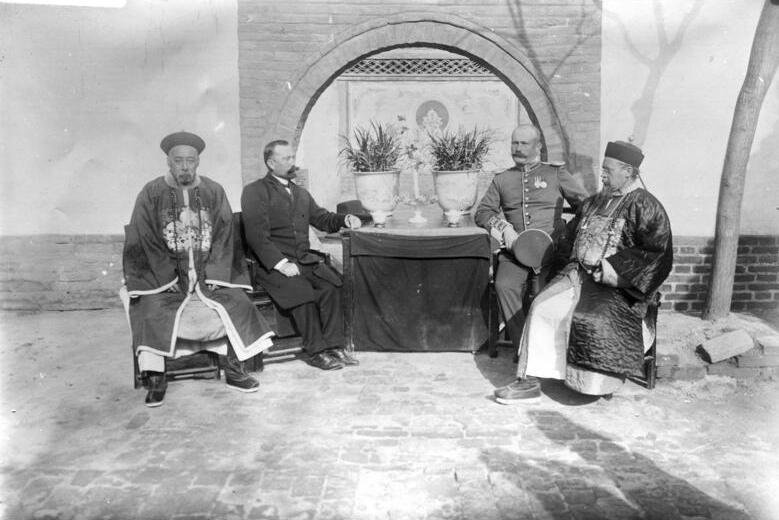 Schutztruppe Kiautschou 1902:Besuch Hptm v. Schoeler in Yen tschou fu